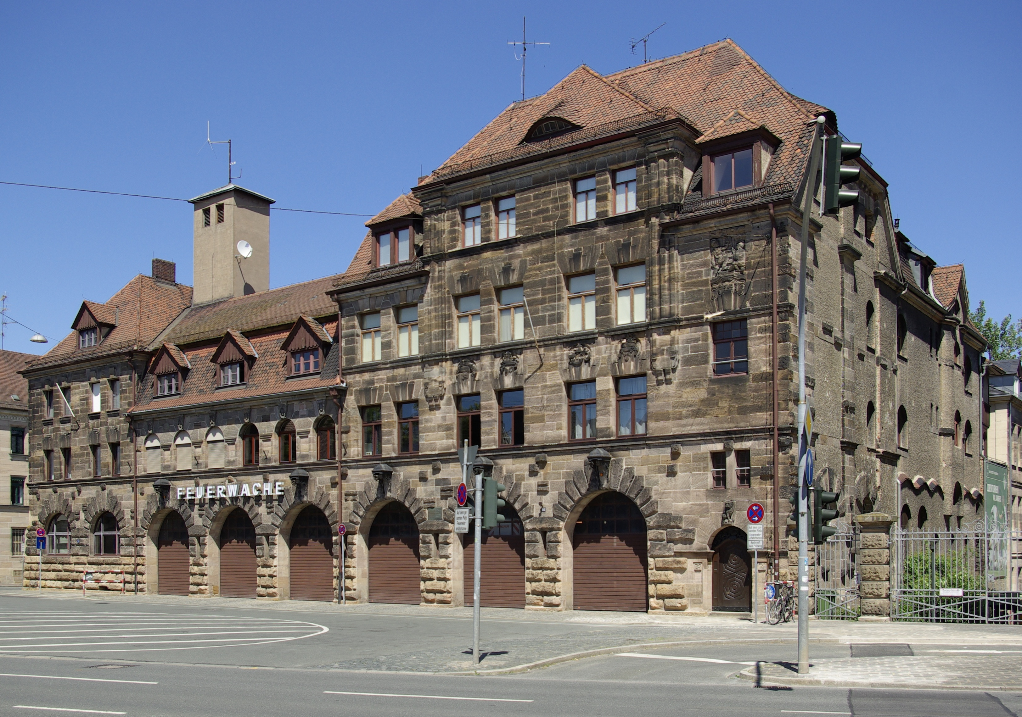 Städtische Feuerwache in der Königstraße in Fürth